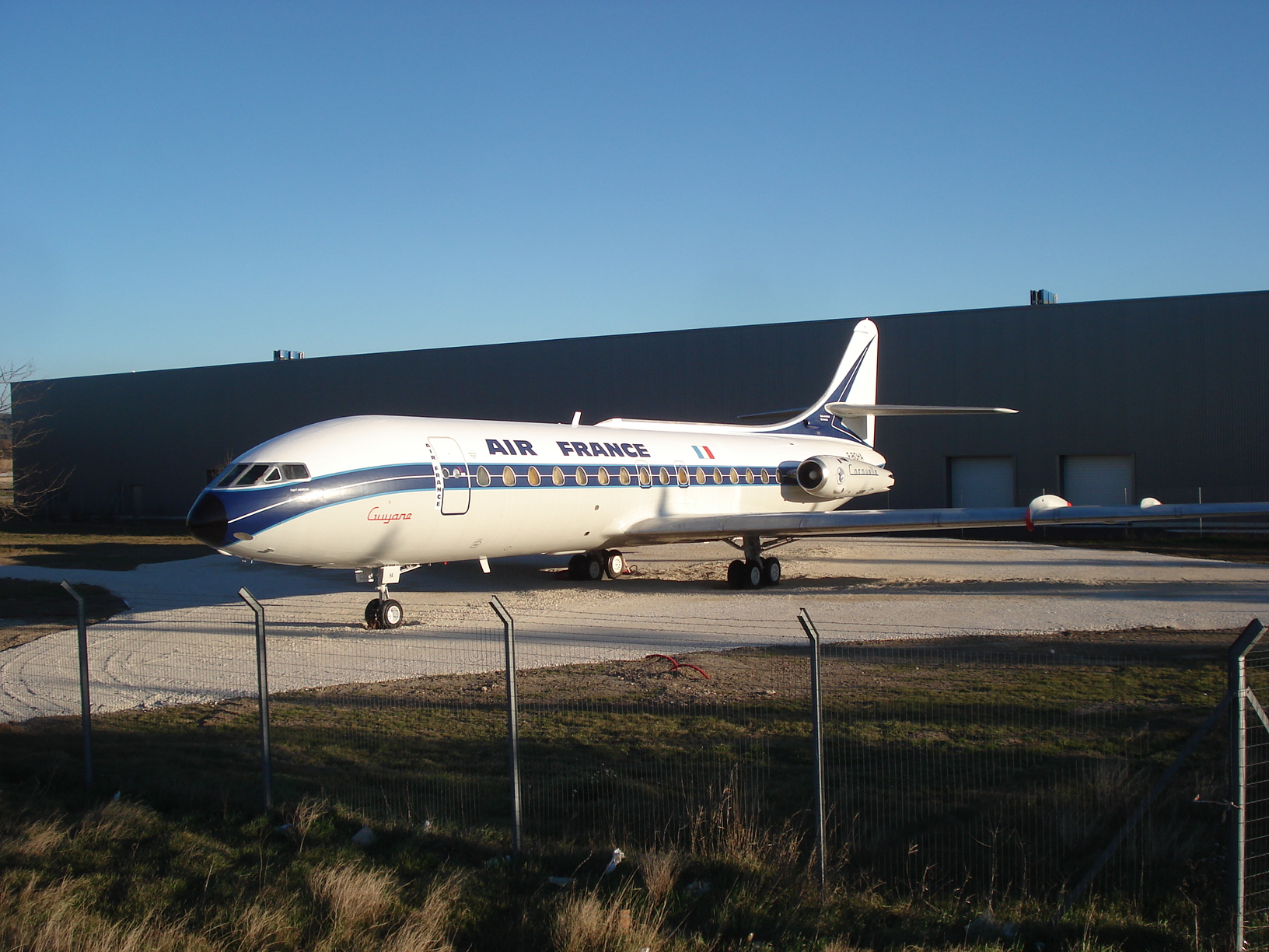 Caravelle III Air France "Guyane" restaurée et exposée à l'Aéroport d'Avignon. Site officiel